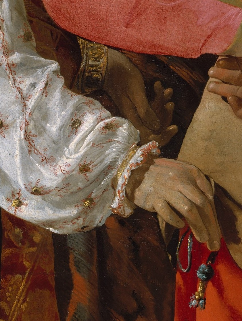 La Diseuse de bonne aventure La Tour détail des mains